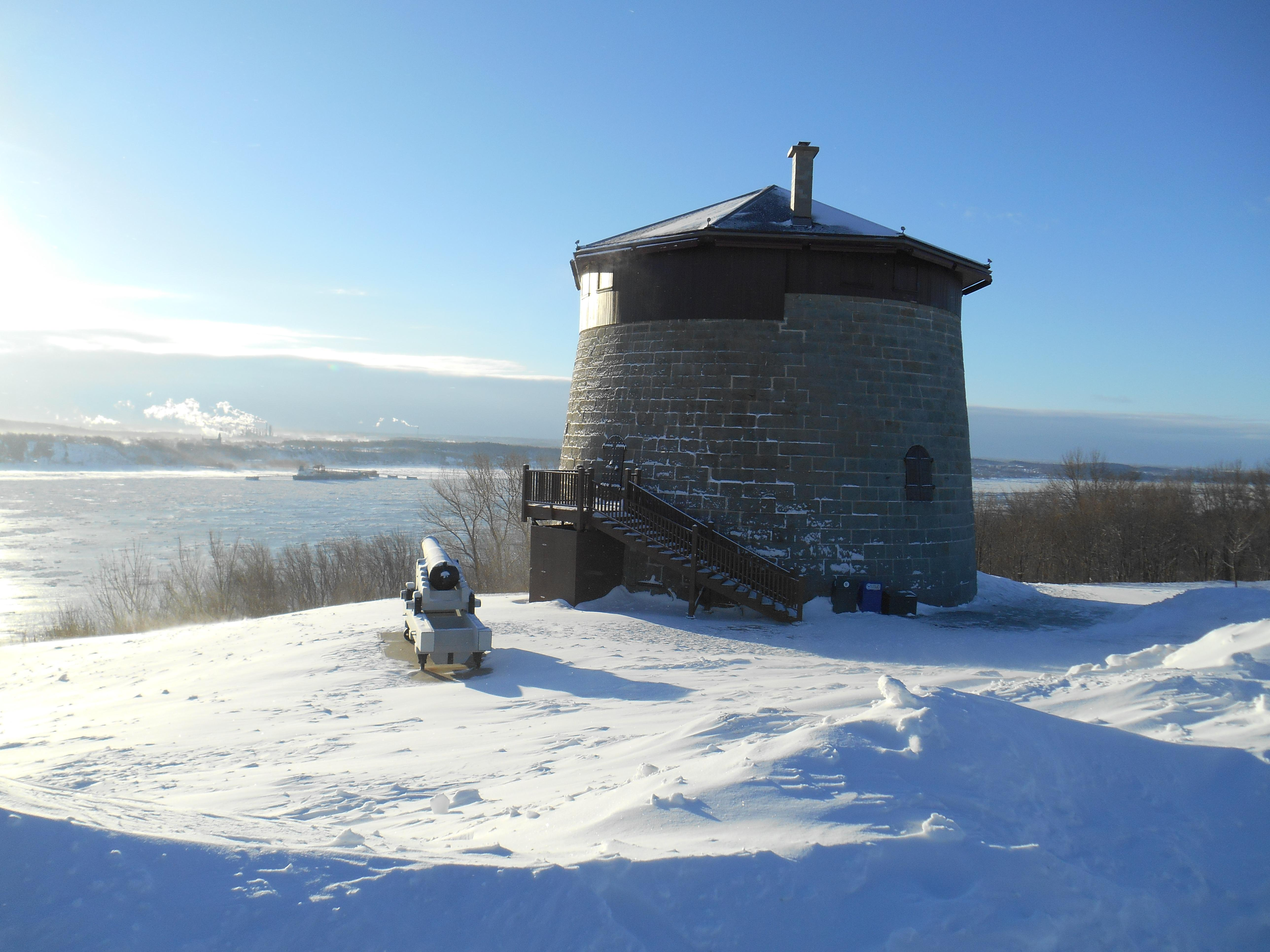 Tour Martello de Québec numéro 1